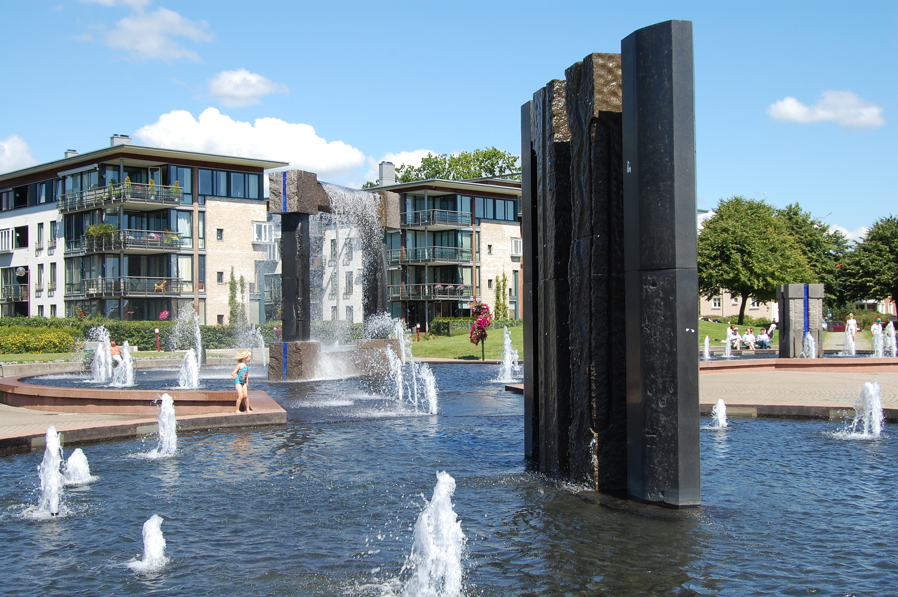 Nupenanlegget